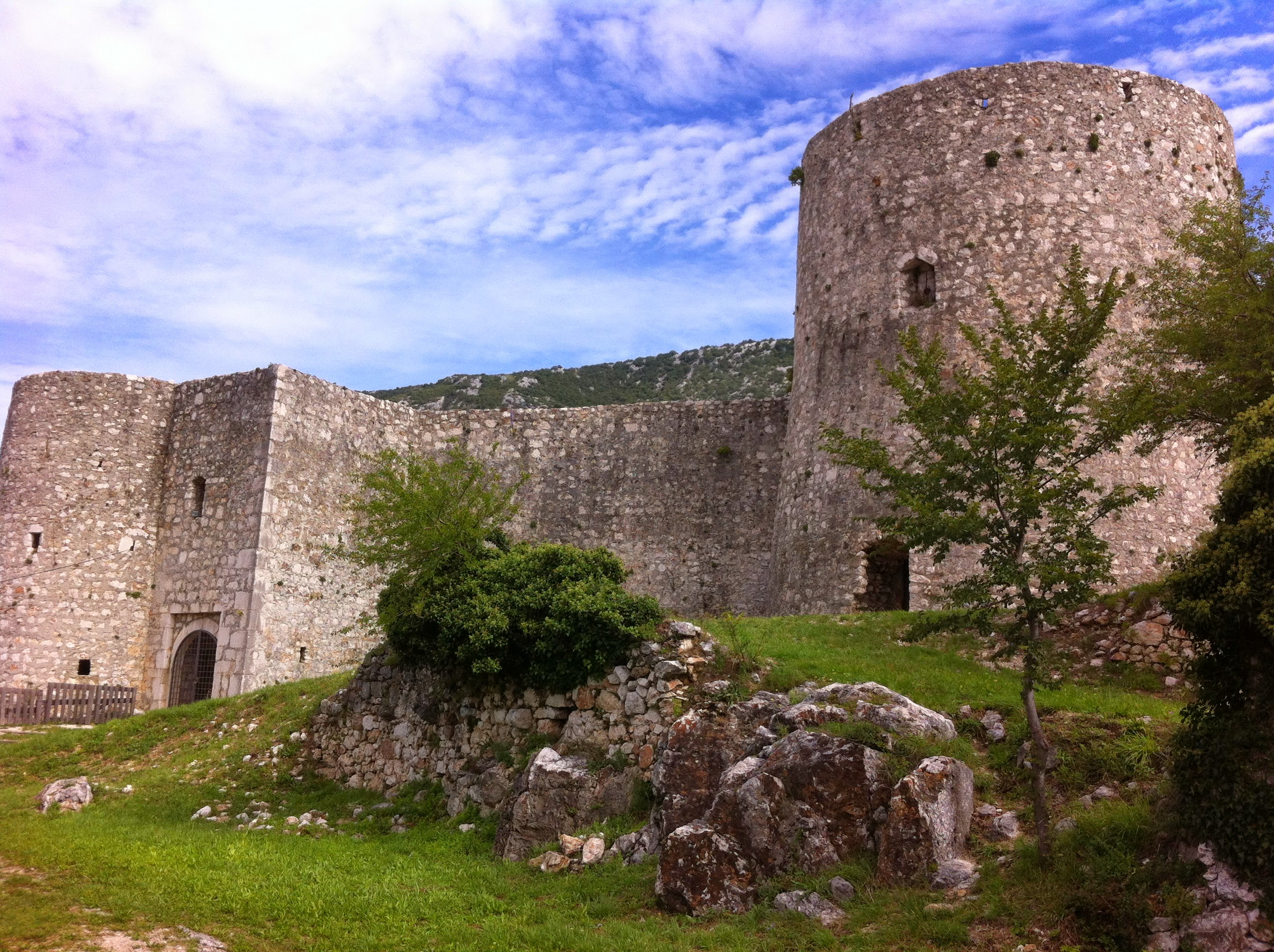 Kaštel Drivenik